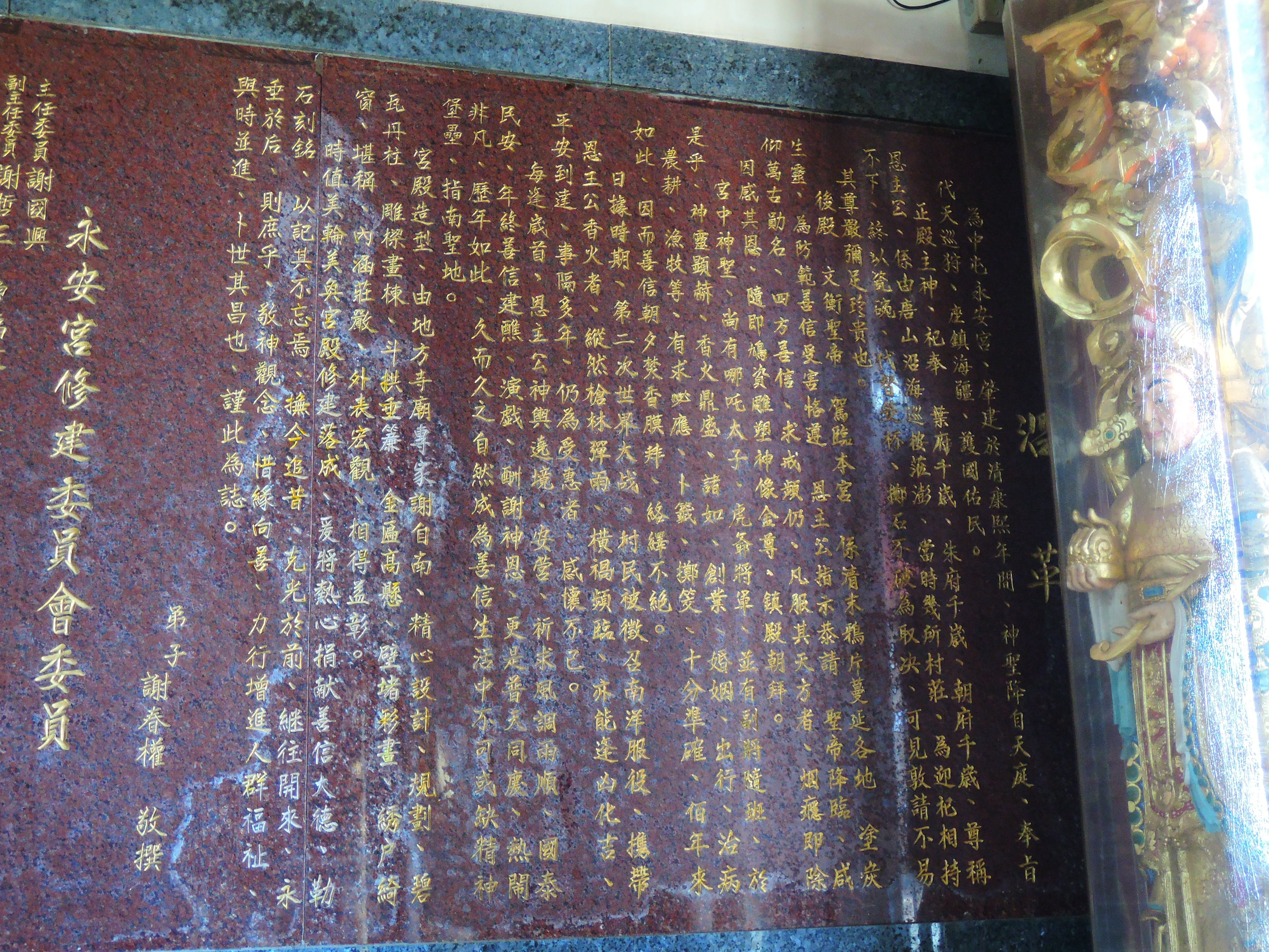 澎湖白沙鄉中屯嶼公廟，主祀文衡帝君。